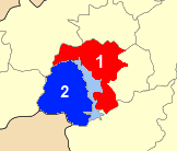 Χάρτης των ενοτήτων (και πρώην δήμων) από τις οποίες αποτελείται ο Δήμος Λίμνης Πλαστήρα